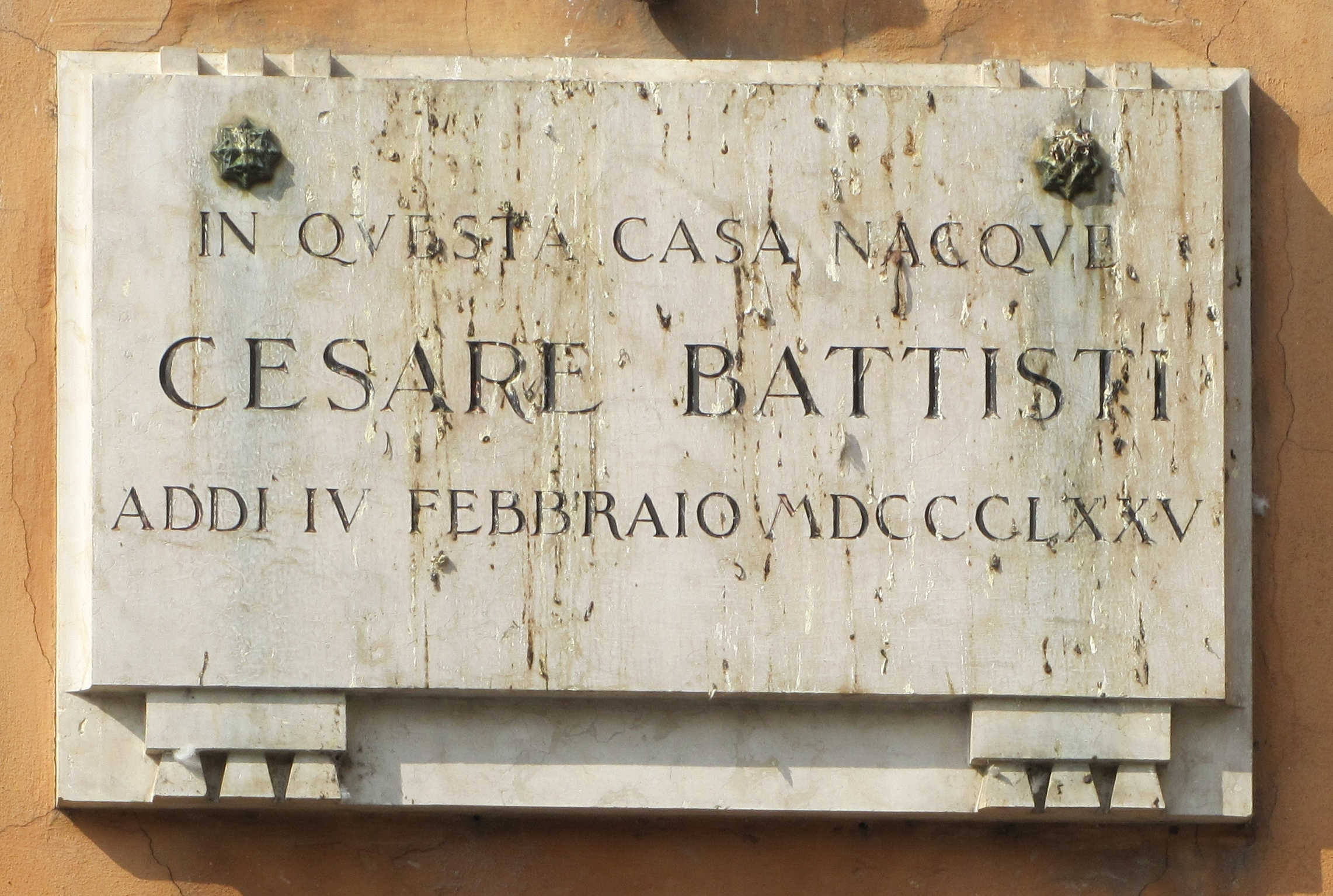 Gedenktafel am Geburtshaus von Cesare Battisti